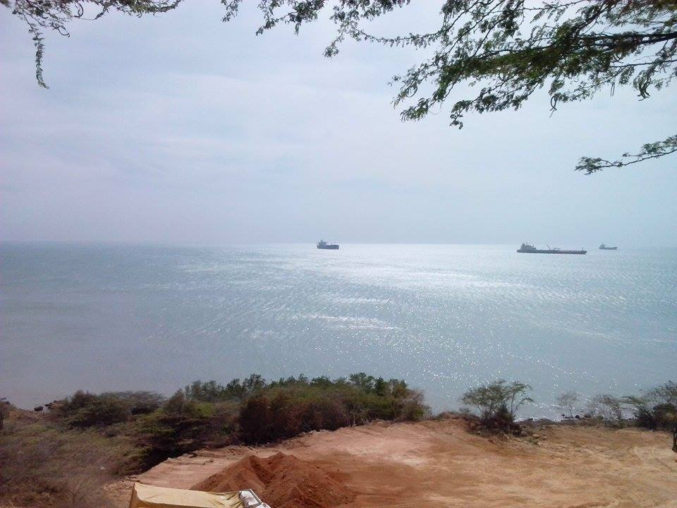 Vista de Playa Manaure, Punto Fijo, Falcón, Venezuela.